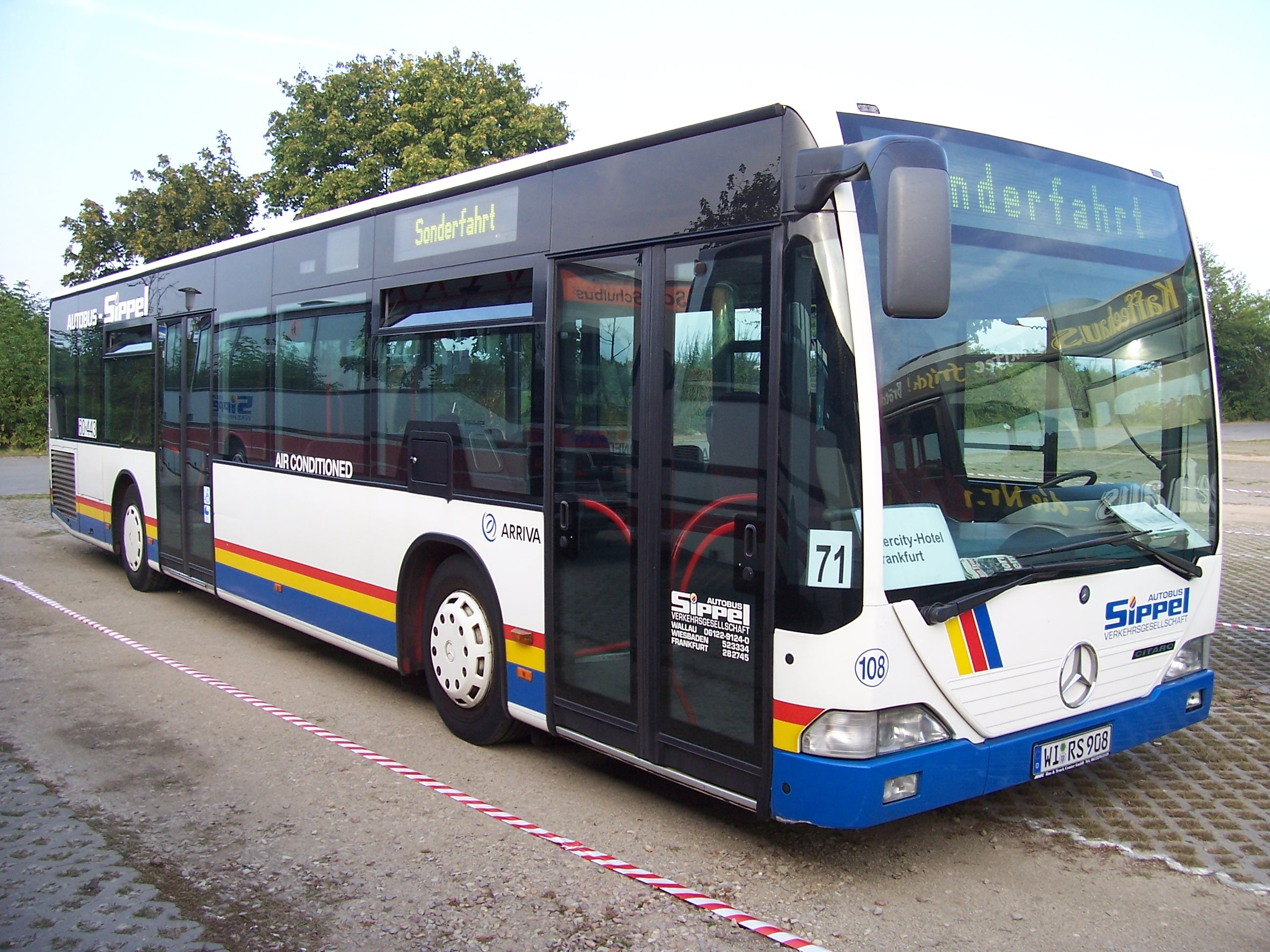 Ein Mercedes-Benz Citaro von Autobus Sippel anläßlich einer Veranstaltung/Sonderfahrt in Mannheim